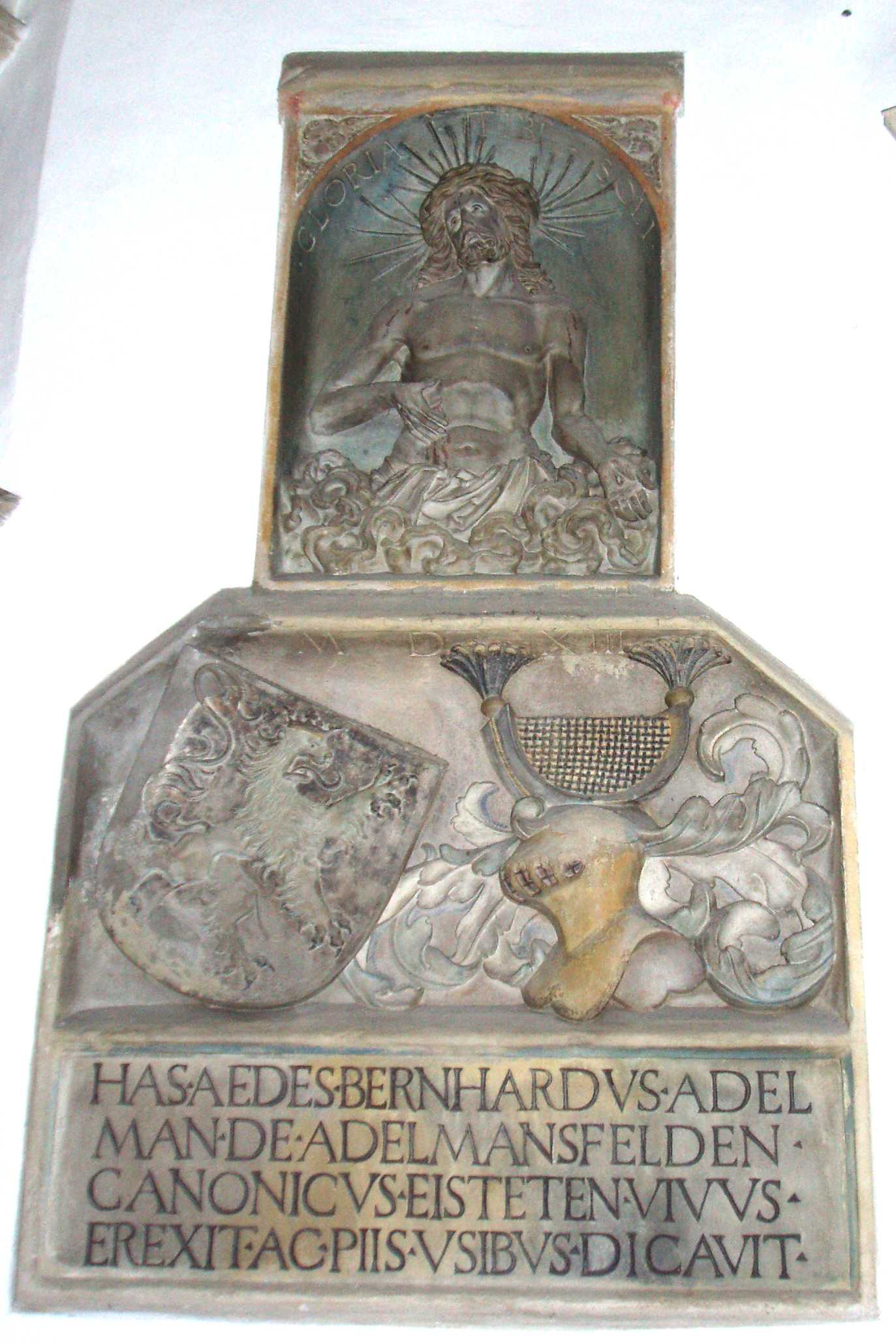 Gedenktafel an Bernhrd Adelmann von Adelmannsfelden, 1513, Eichstätt, Dom-Mortuarium